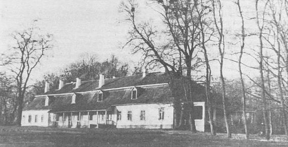 Беларуская (тарашкевіца): Ражанка (Ražanka), сядзіба Пацаў (Pac)